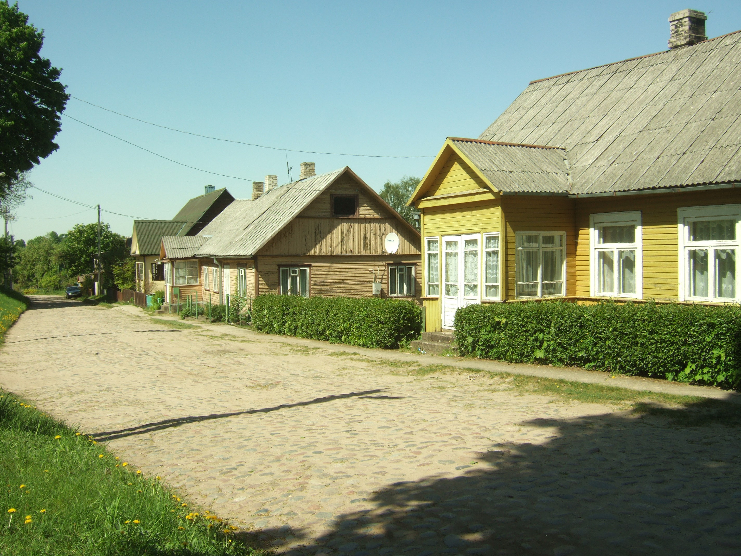 Semeliškės